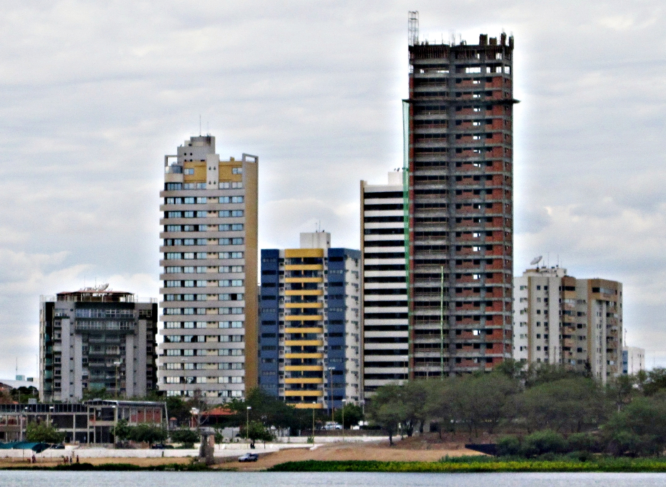 Orla I - Petrolina, Pernambuco, Brasil